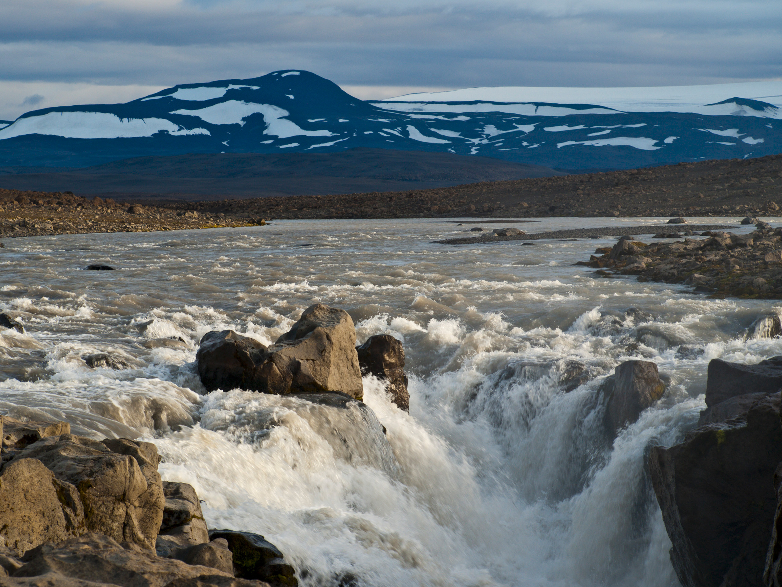 Gengið meðfram Skjálfandafljóti 10.-15. ágúst 2009. Nafnlaus foss sem fellur í nanfnlaust gljúfur.